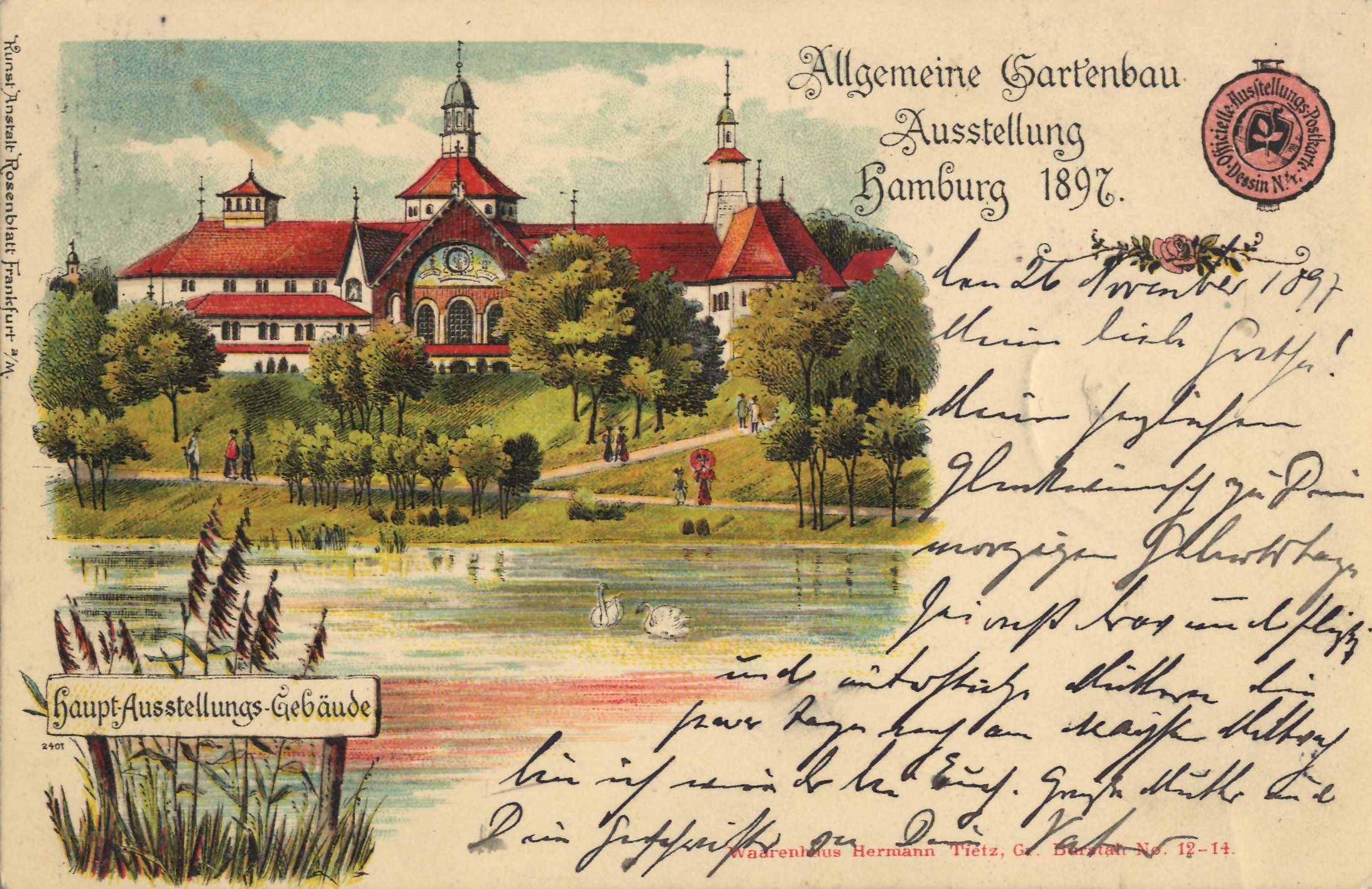 Allgemeine Gartenbau Ausstellung Hamburg 1897. Haupt-Ausstellungs-Gebäude.